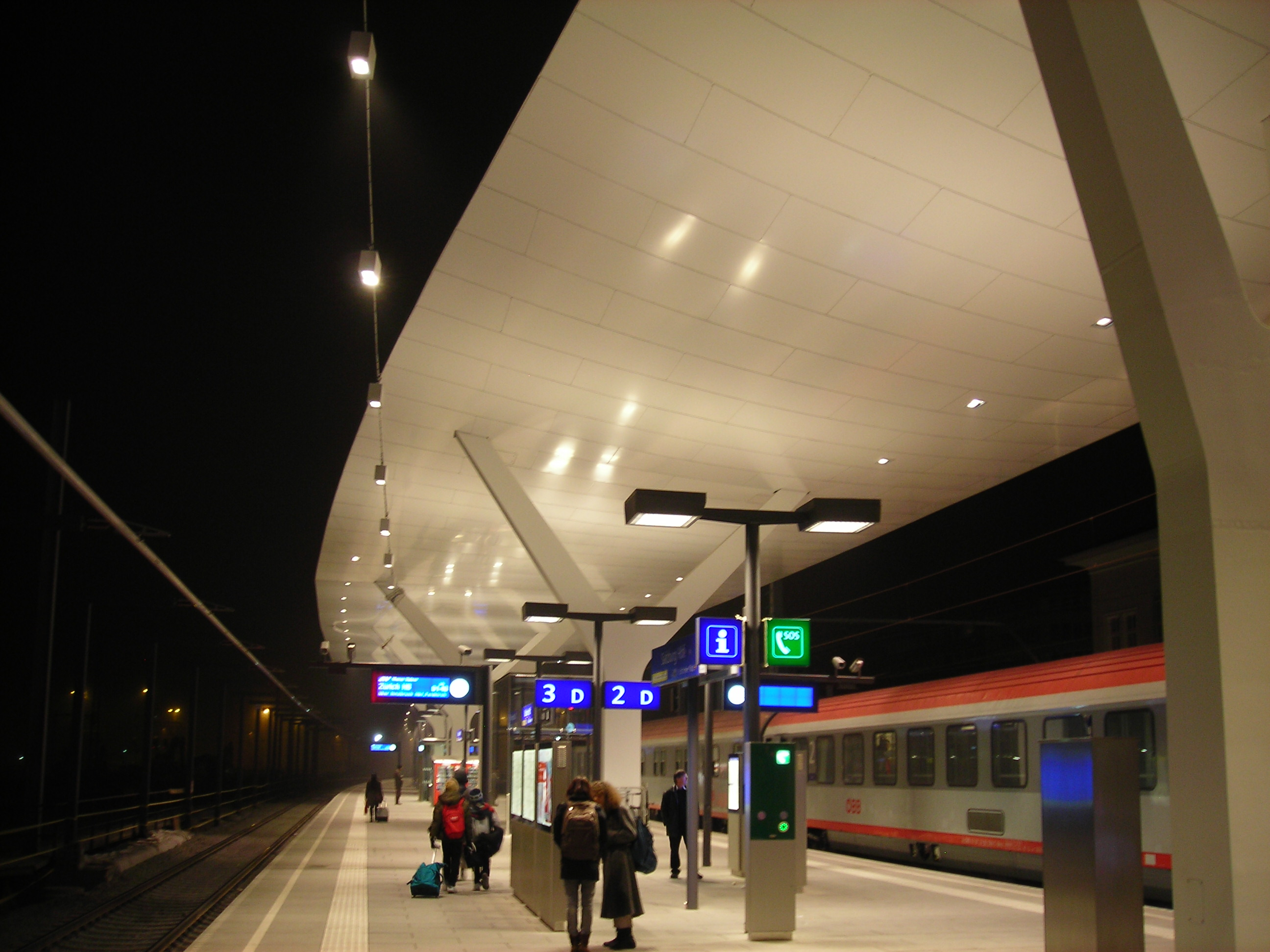 Salzburg Hauptbahnhof 2011 november 26-án kora hajnalban az átépítése idején